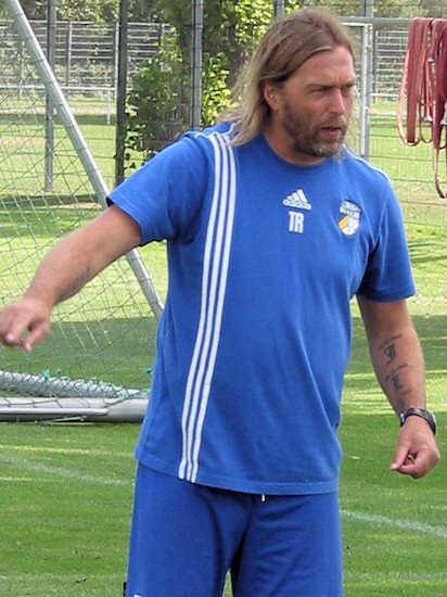 René van Eck beim Training am 11. September 2009 beim FC Carl Zeiss Jena